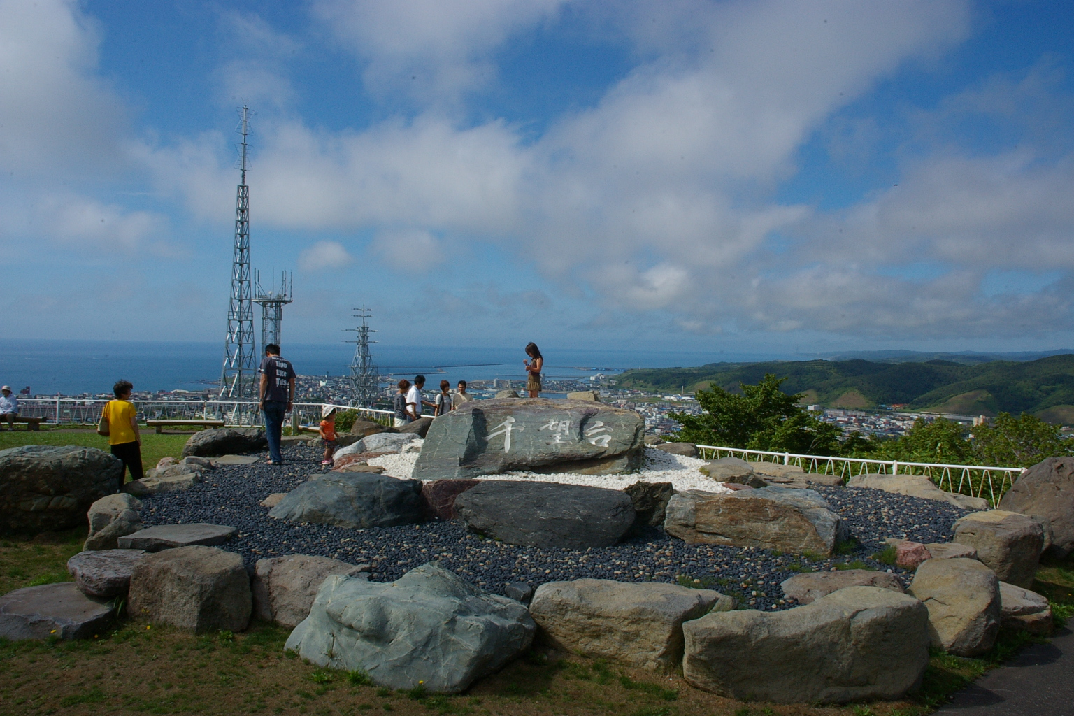 Senboudai in Rumoi city hokkaido.